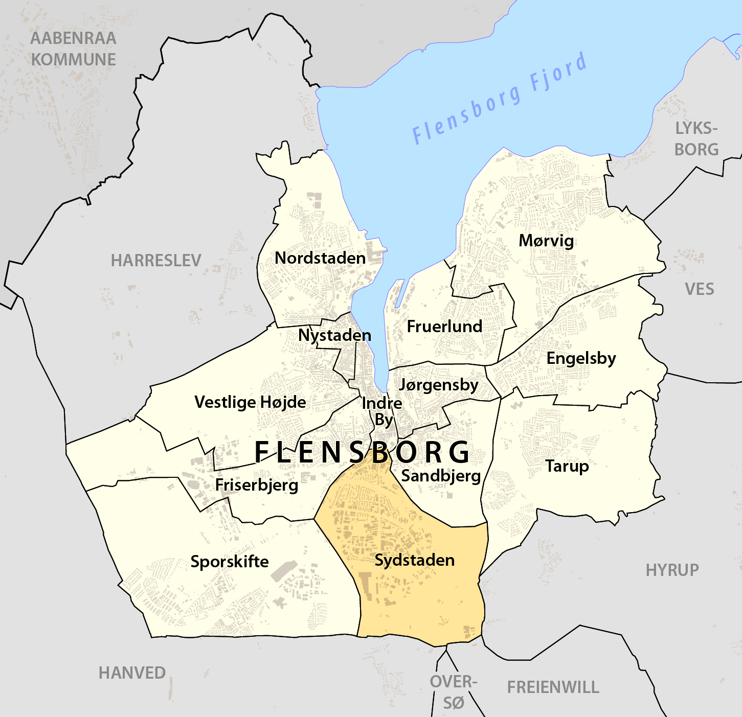 Beliggendhed af Sporskifte i Flensborg Kommune